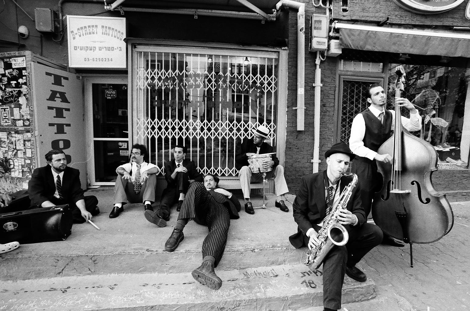 חברי להקת ההודסקא אקספלוסיב סקא מסורתי ישראלי